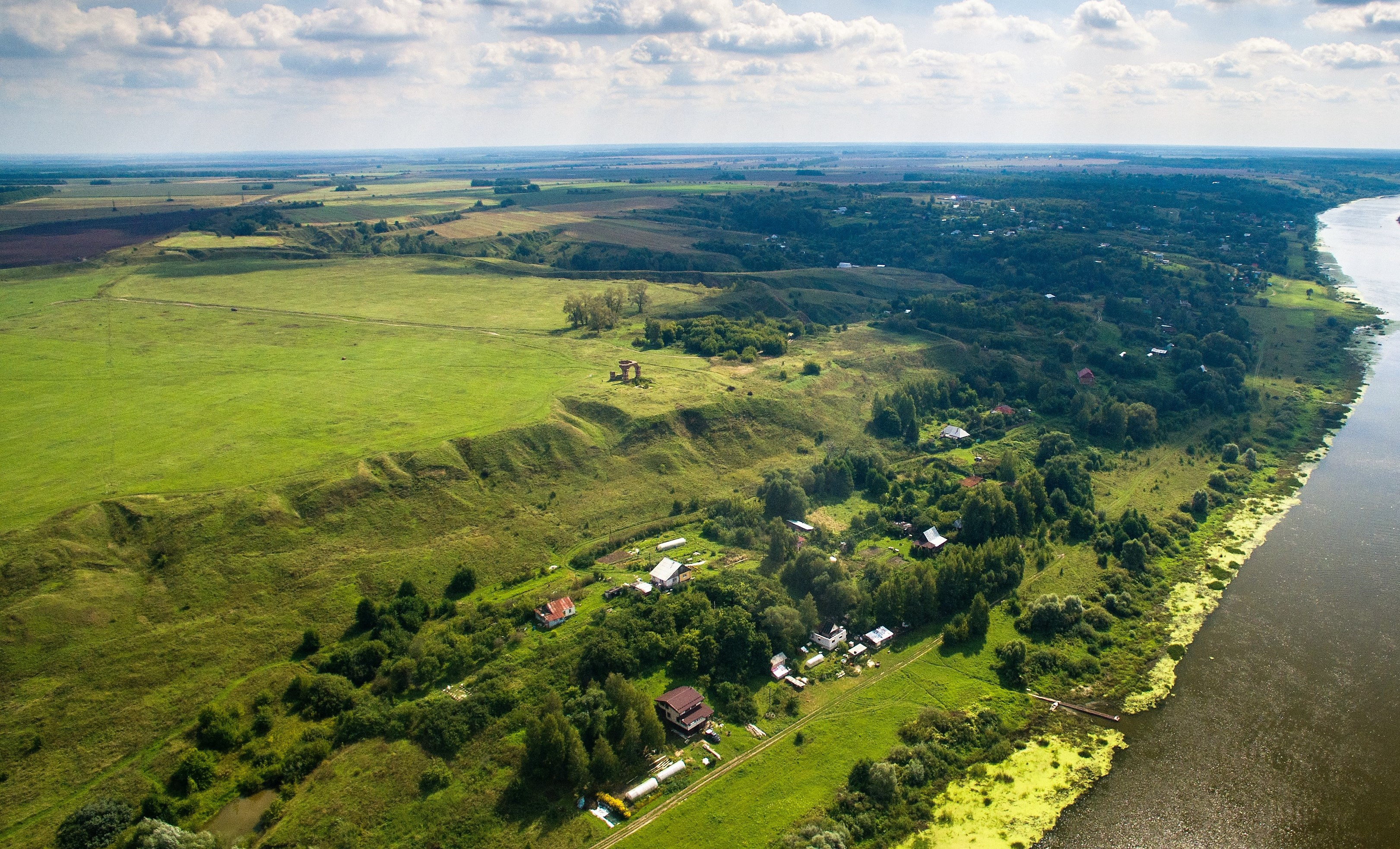 Городище "Старая Рязань" (детинец, посад, святилище древнерусского города Рязань): юго-восточнее села, Старая Рязань, Спасский район, Рязанская область